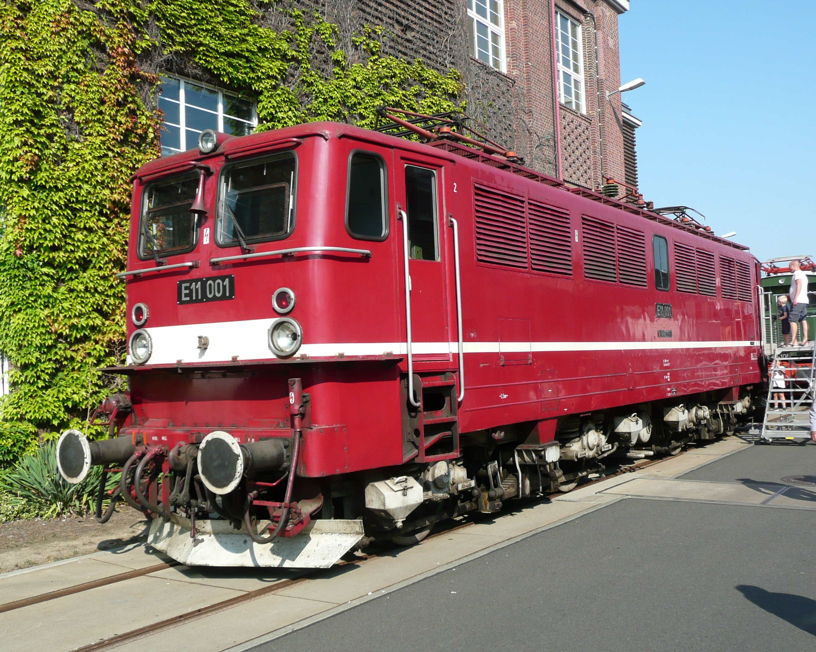 E 11 001 im Aw Dessau